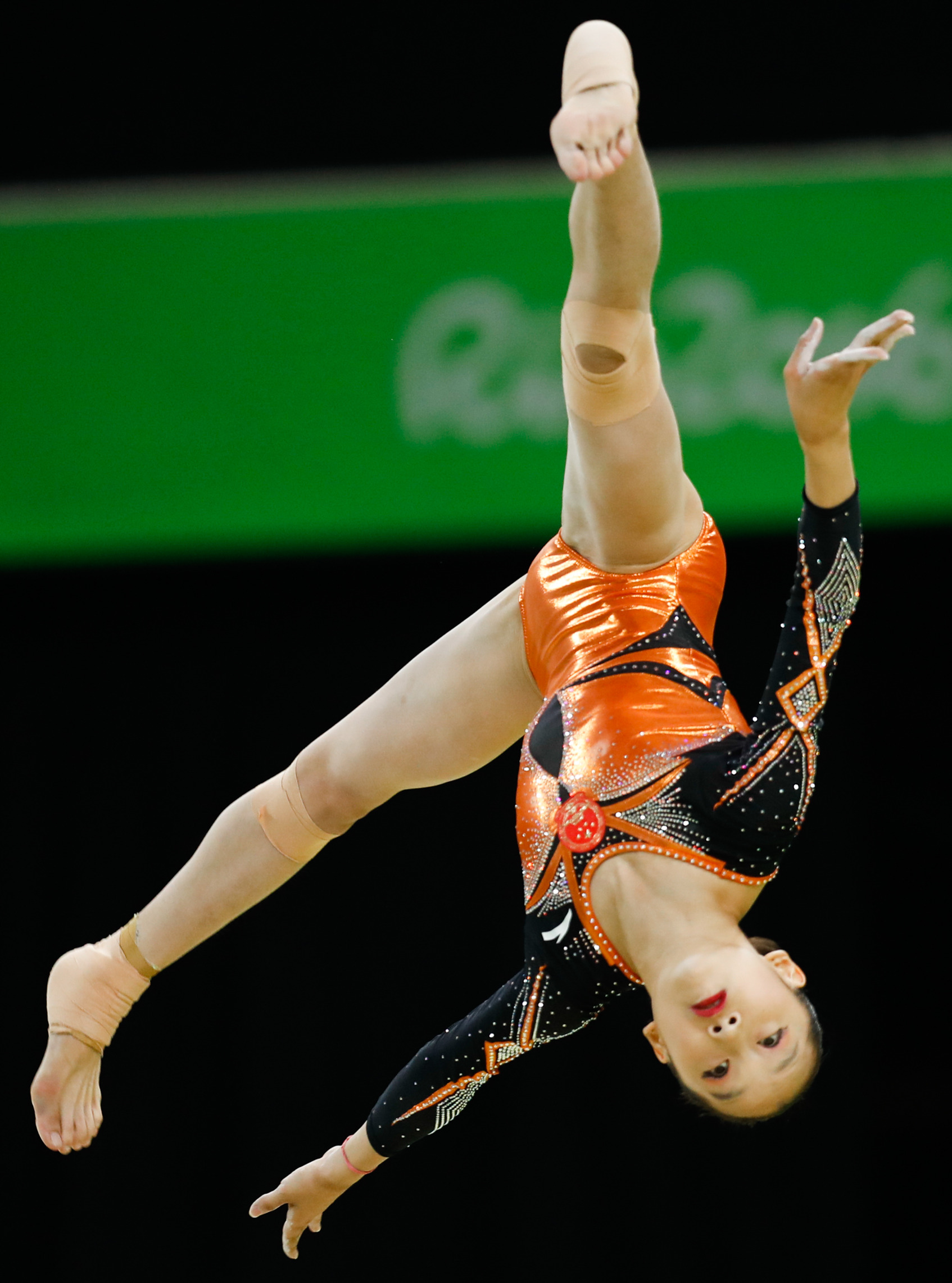 Rio de Janeiro - Ginasta da China Yilin Fan termina final por aparelhos da trave na 6ª colocação (Fernando Frazão/Agência Brasil)